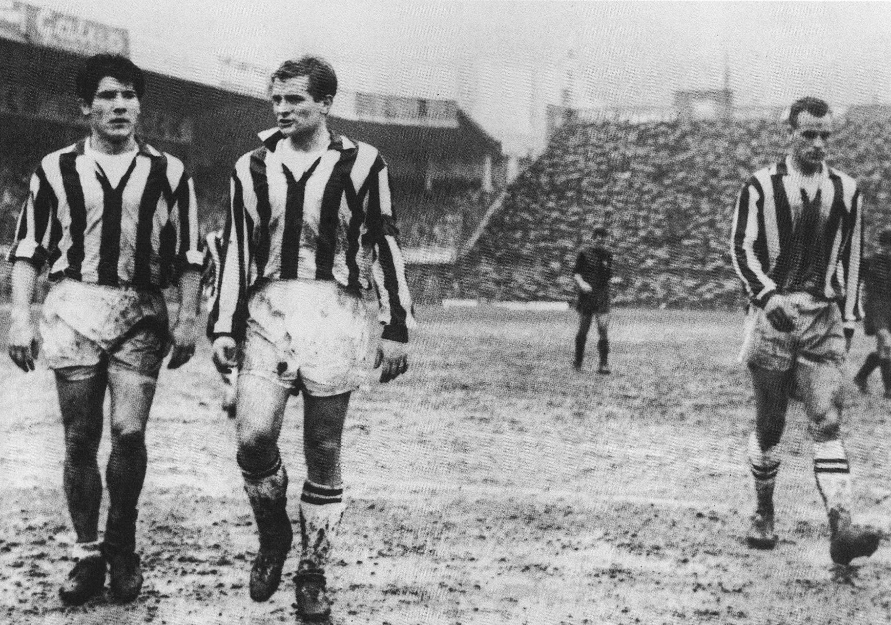 Il Trio Magico d'attacco della Juventus – da sinistra: l'italo-argentino Omar Sívori, l'italiano Giampiero Boniperti e il gallese John Charles – lascia il campo al termine di una partita del campionato italiano di Serie A 1957-58.